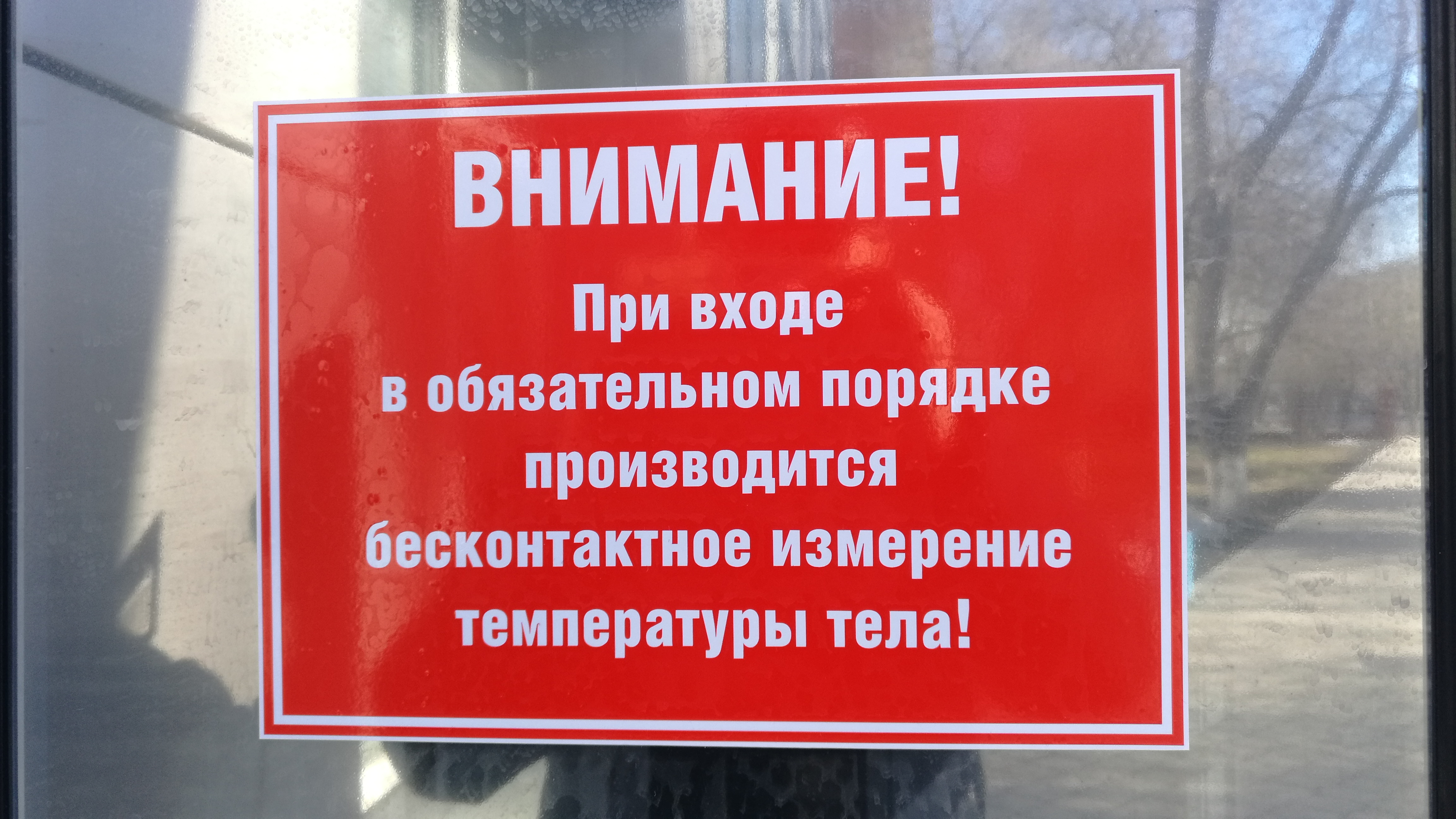 Averto pro mezurado de korporemperaturo. Tjumeno, Rusio.